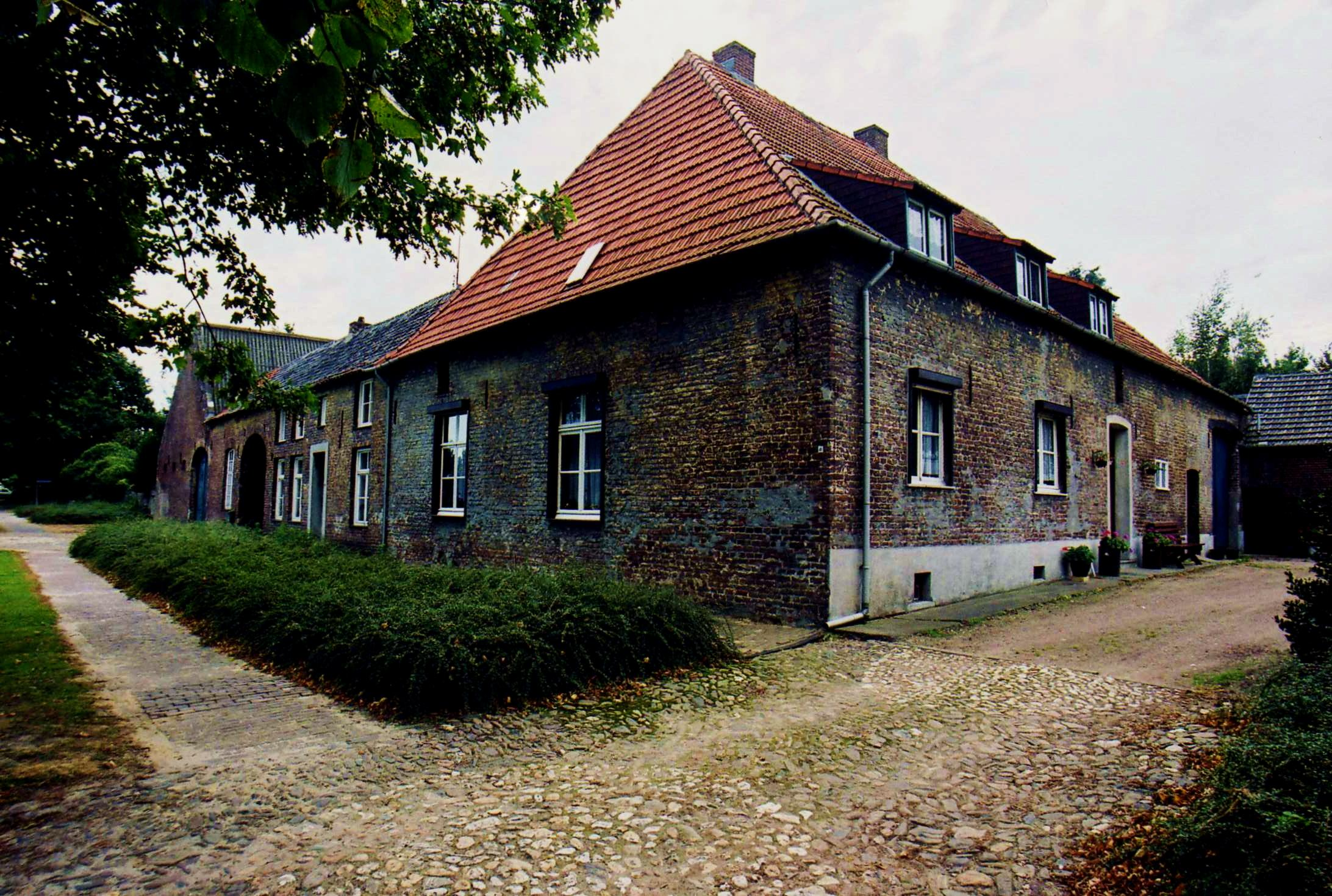 't Huis ter Beeten of Strikkenhof te Nunhem.